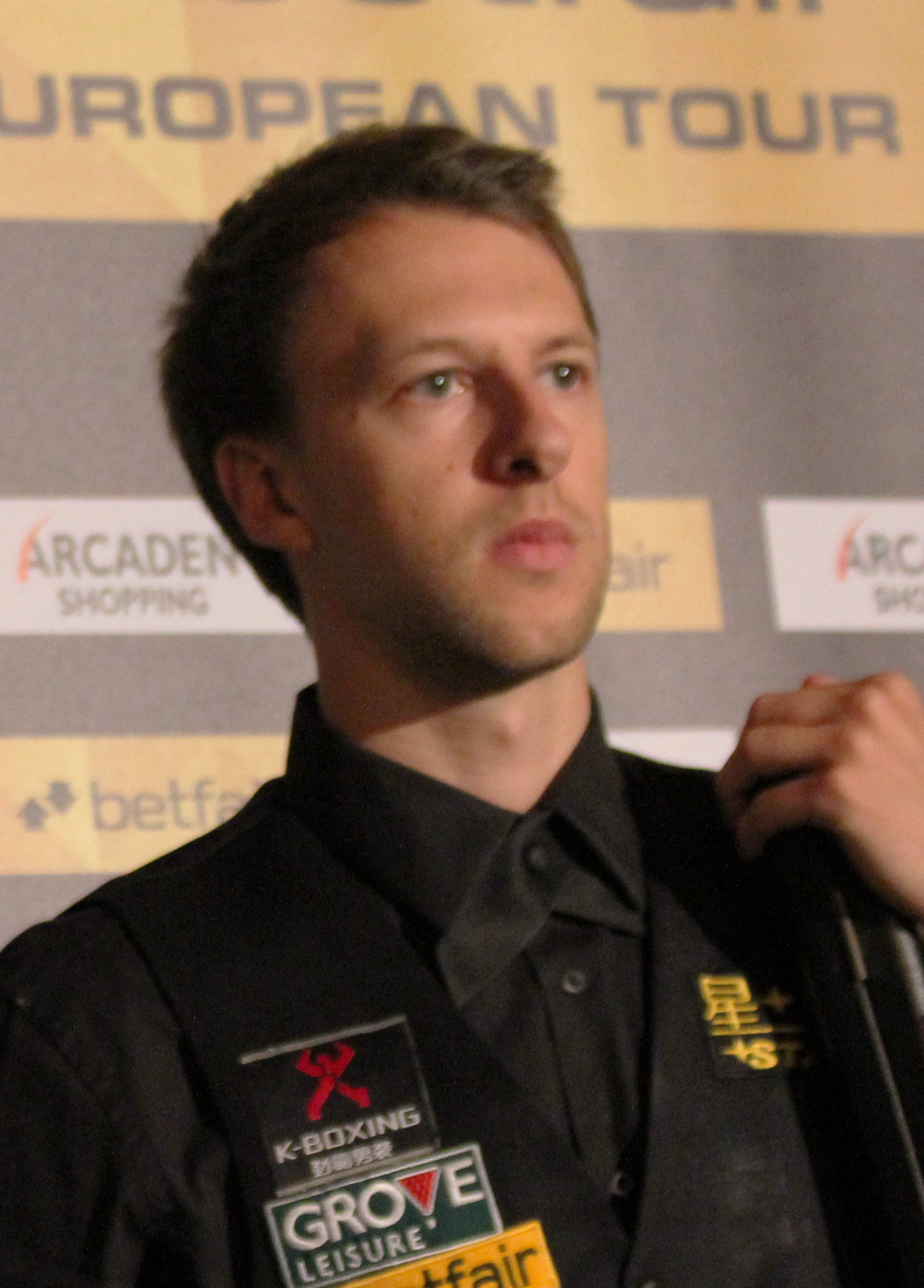 Judd Trump beim Paul Hunter Classic 2012